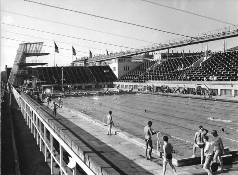 Zentralbild-Koch sche-pr 12.9.1966 Sportstätten der DDR Eine schnelle 50-m-Bahn (Foto), sowie ein 55 Yard-Becken ist eines der Schmuckstücke des Leipziger Sportforums. Wie schnell die Bahn ist, bewiesen die vielen Weltrekorde in den Yarddisziplinen, die die DDR-Schwimmer hier aufstellten.